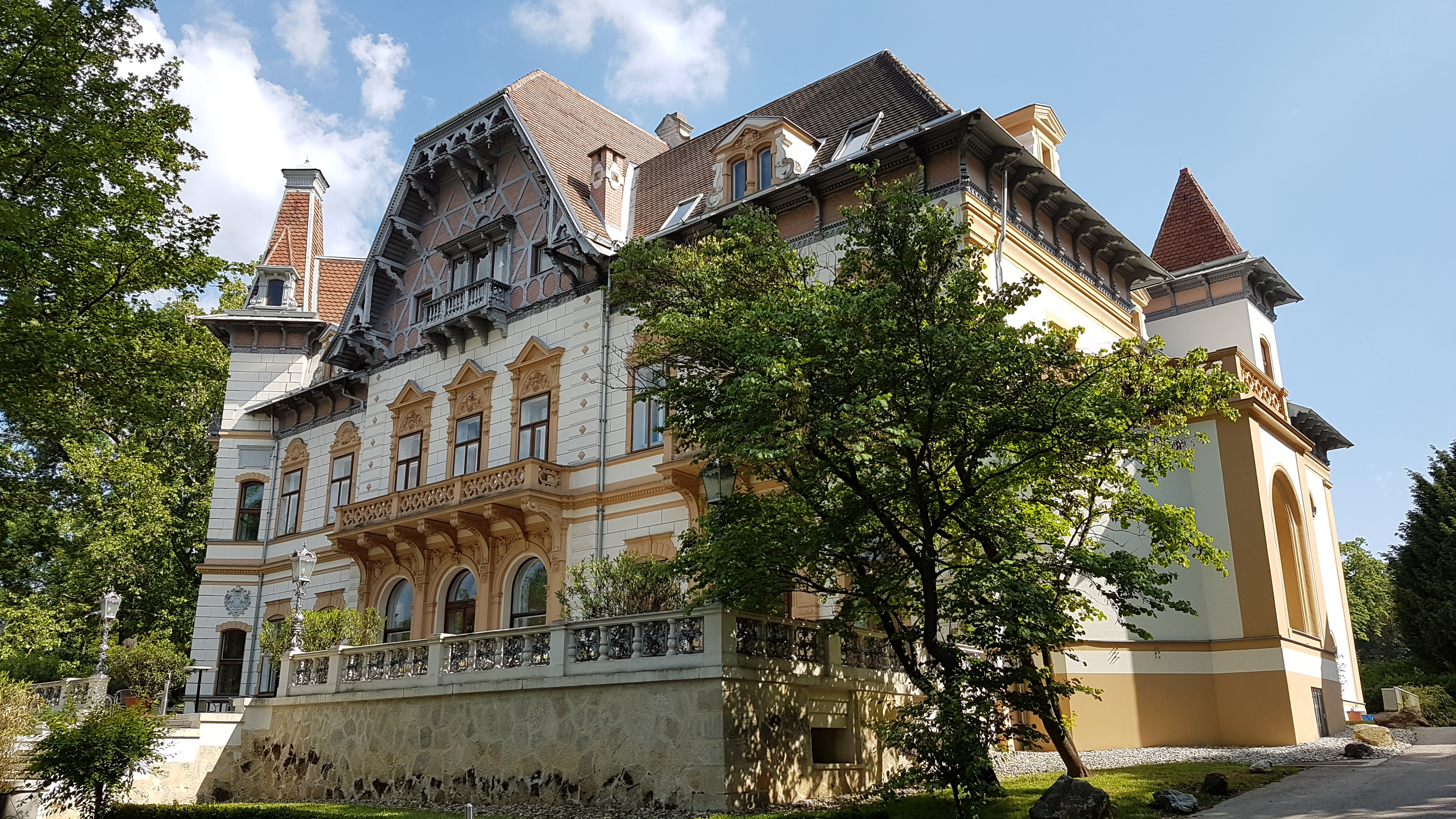 Wien-Meidling, Springer-Schlösschen, der Wiener Großindustrielle Gustav Freiherr von Springer (1842–1920) kaufte der Familie Hügel das Areal ab und ließ 1887 vom Büro Fellner & Helmer das Springer-Schlössl im historisierenden Heimatstil (mit Neurenaissance-Elementen) errichten.